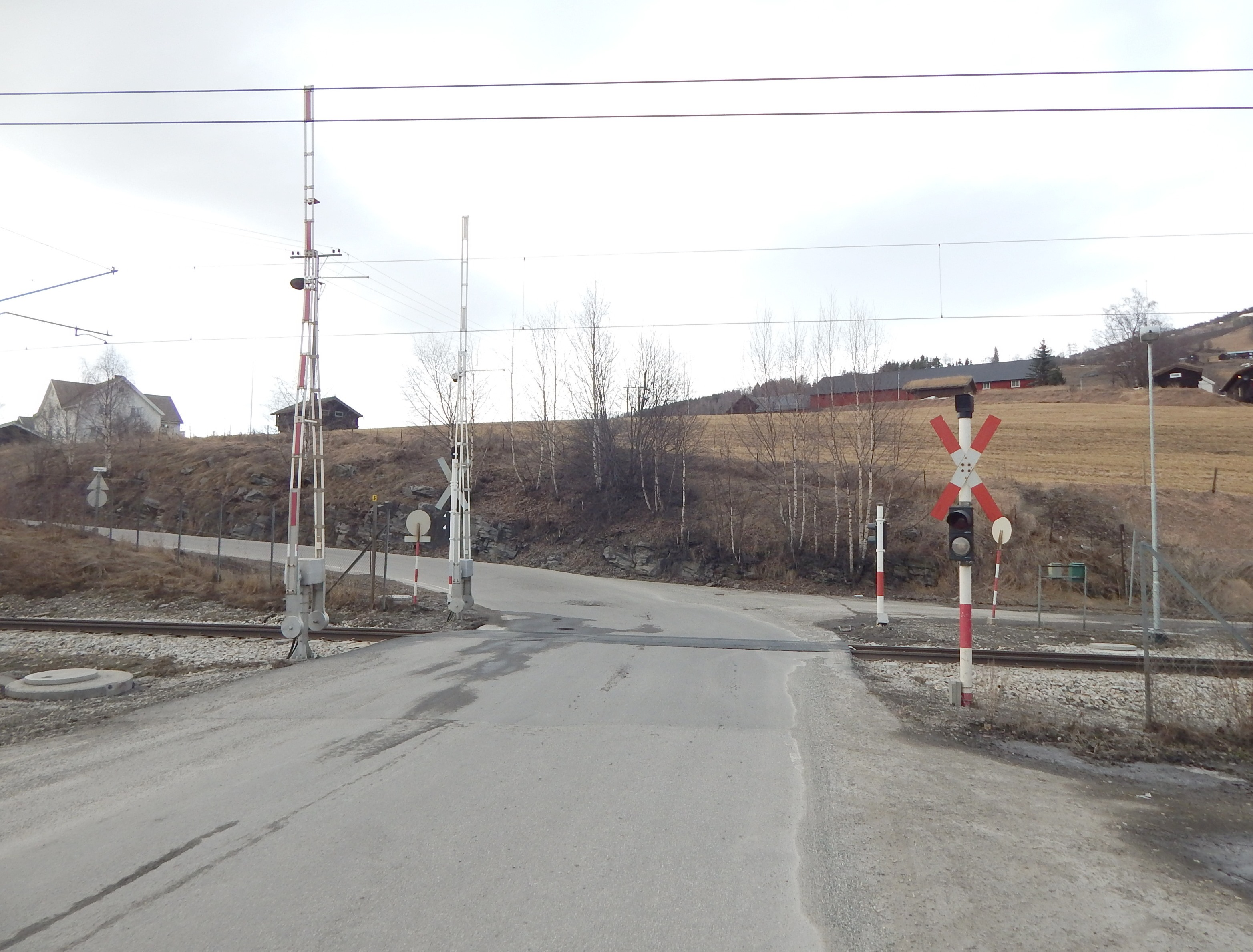 Primær fylkesvei 256 krysser Dovrebanen vest for Hundorp stasjon.